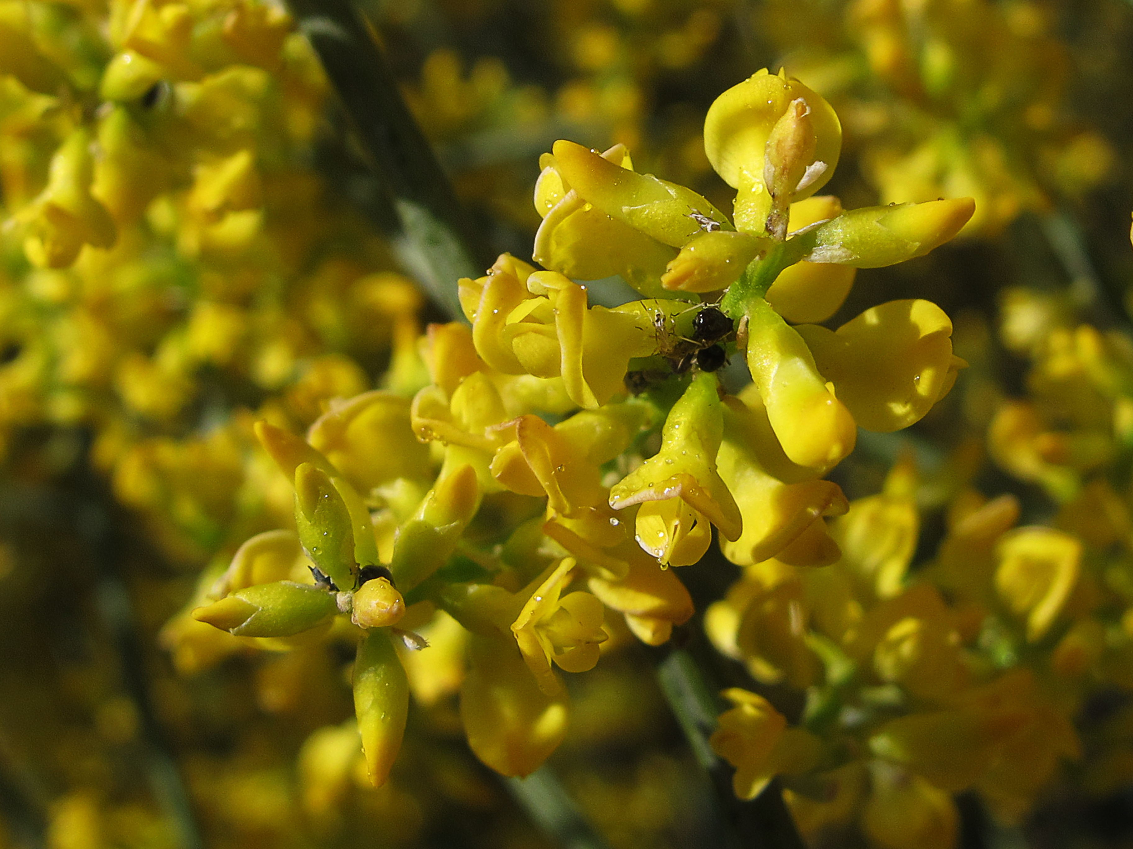 Arbusto que puede alcanzar 3 m de altura generalmente desprovisto de hojas, grisáceo y muy ramificado. Las flores son papaleonáceas amarillas, muy pequeñas de 5-8 mm de longitud, agrupadas en racimo Crece en matorrales seriales producidos por la degradación de los encinares Algunas leyendas contaban que en la retama se contenía el secreto de la inmortalidad, tan buscado y deseado por el hombre a lo largo de la historia. Explicaban, por lo profundo de sus raíces, que en la más profunda de todas, la más delgada, la que más se adentraba en las entrañas de la madre tierra, se encontraba una bolita redonda o nabillo, que llamaban "panacea", la cual, comida, hacía nacer los dientes y muelas, aclaraba la vista, teñía el pelo, renovaba la sangre y devolvía a los viejos la juventud. Tanto se extendieron estas leyendas, que hasta se plasmaban en antiguos manuscritos.